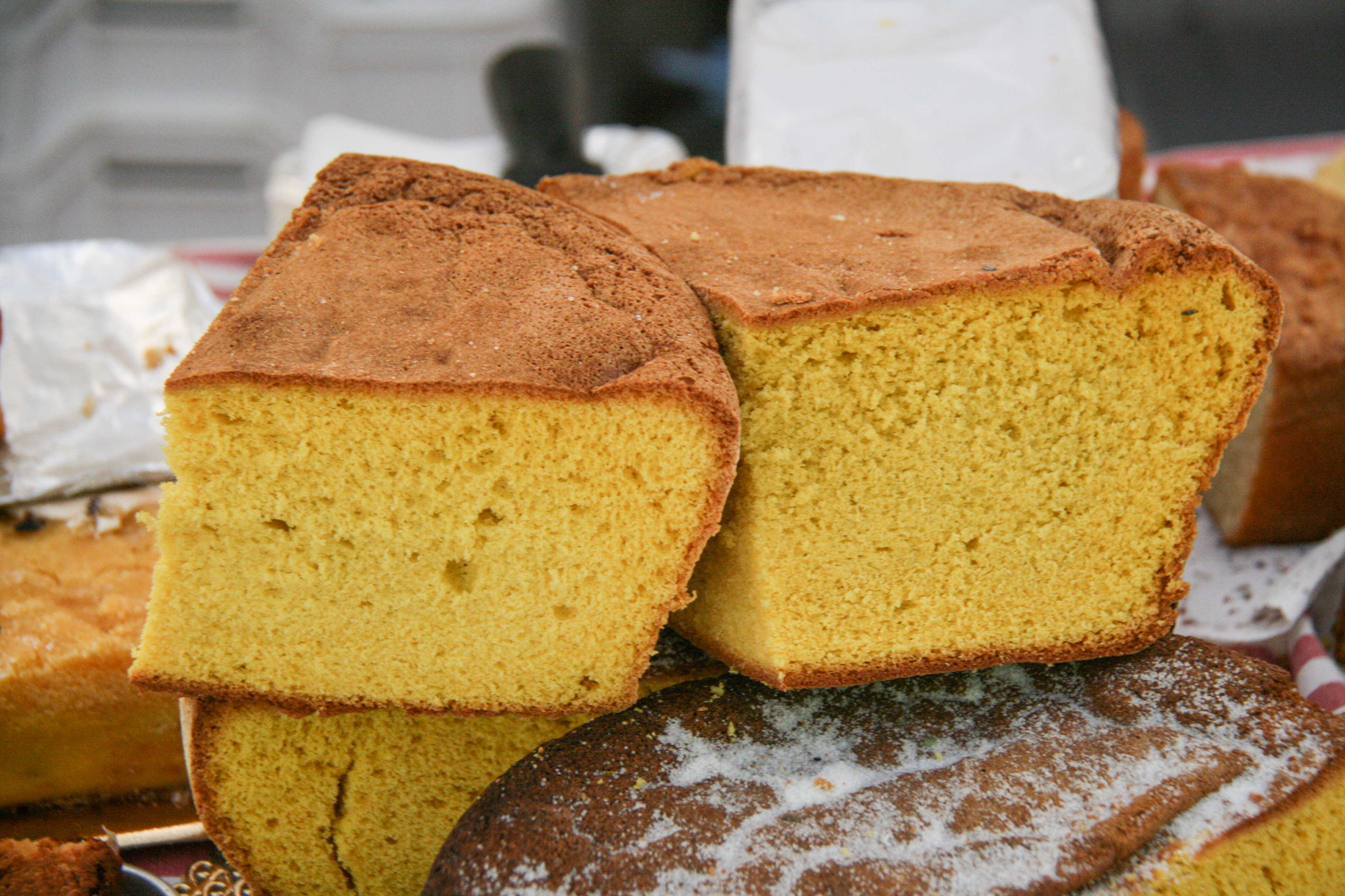 Bizcocho